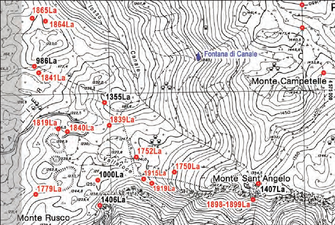 Distribuzione degli ingressi in località Valliera e Vallaroce